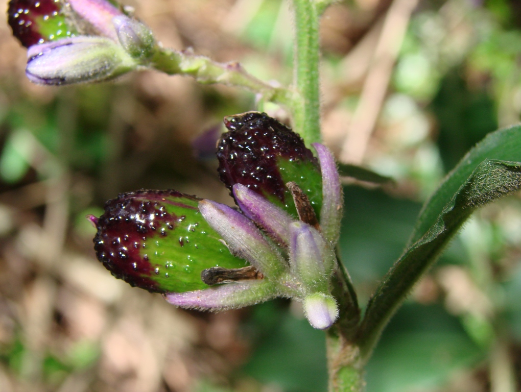 Dichorisandra villosula - COMMELINACEAE Parque Olhos D'Água - Brasília - Distrito Federal - Brasil.